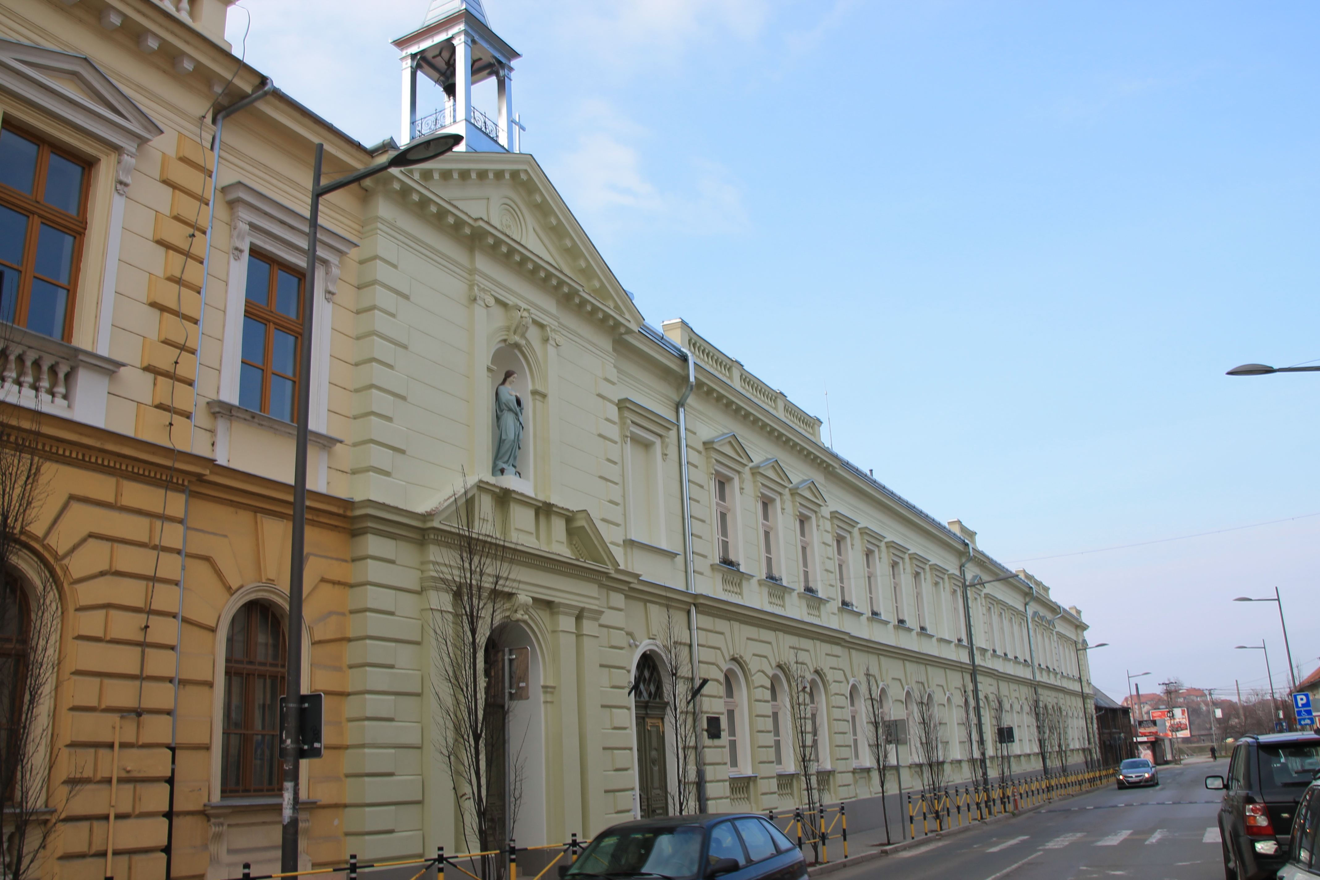 Staro jezgro Zrenjanina